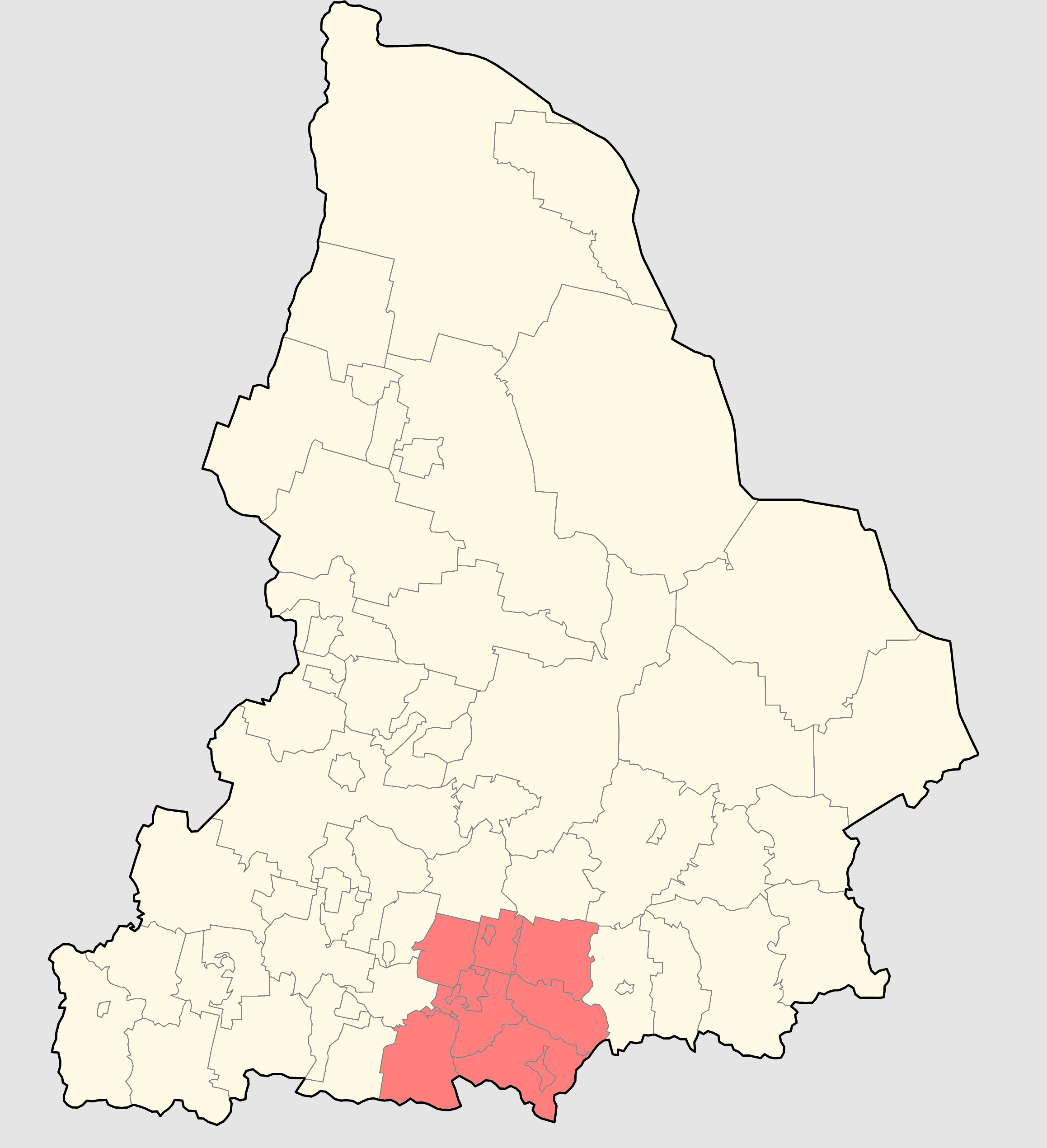 Южный управленческий округ Свердловской области